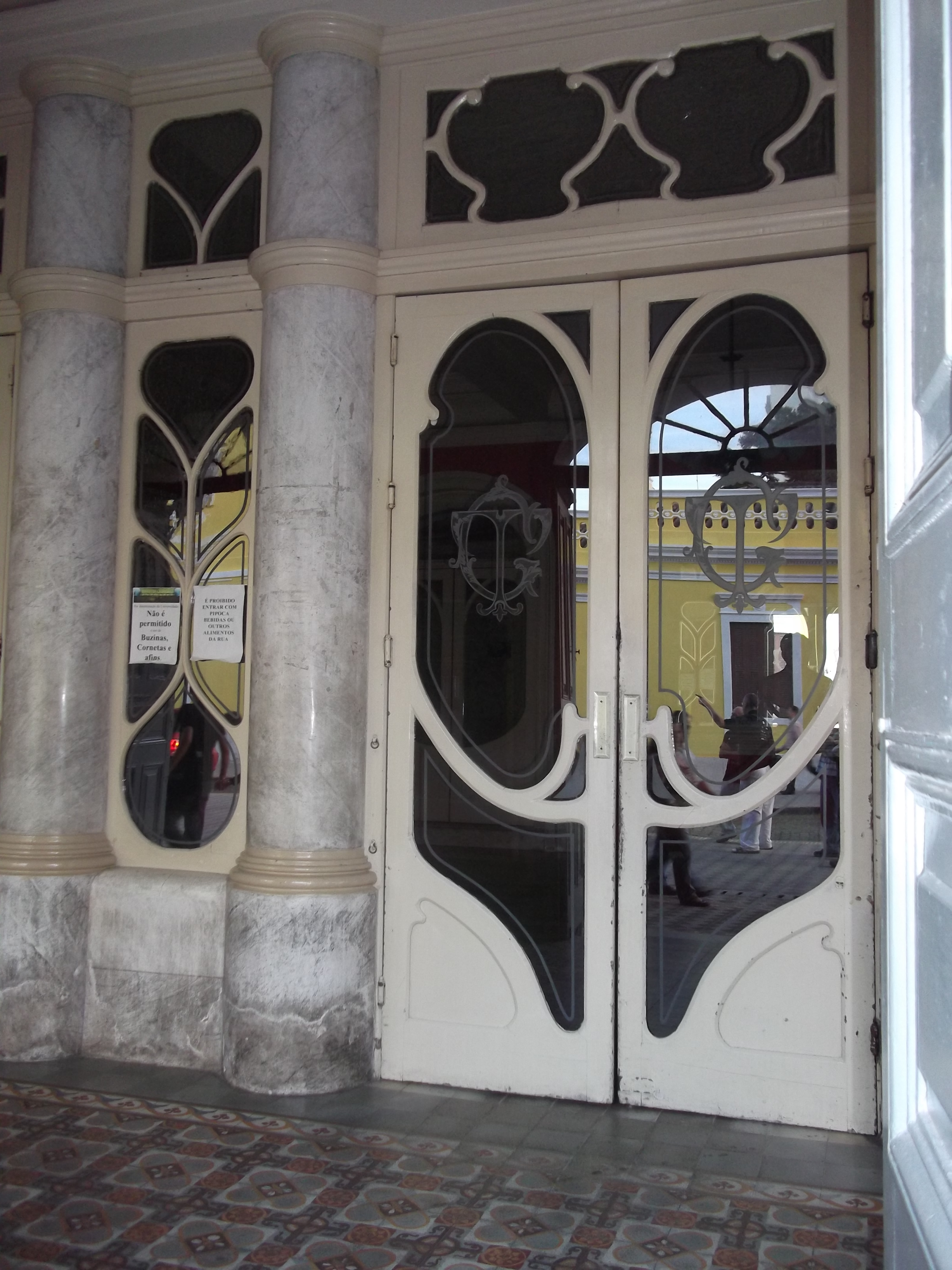 Teatro Guarani